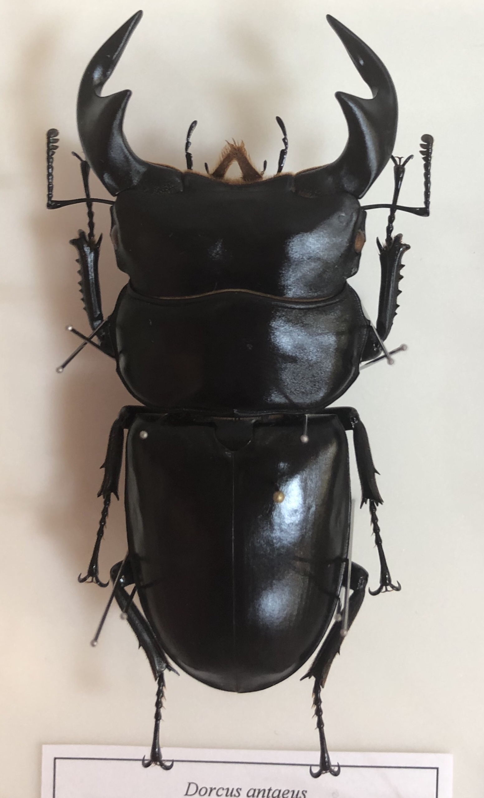 アンタエウス マレー産 81㎜